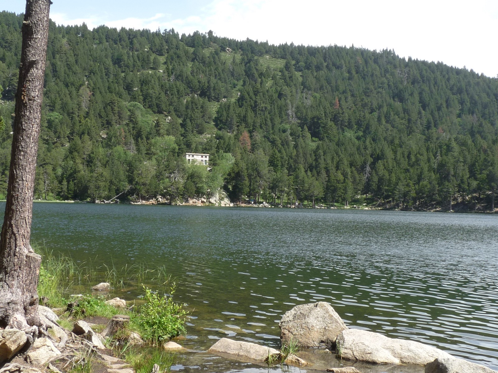 Lac de Balcère, Les Angles, Pyrénées-Orientales, France